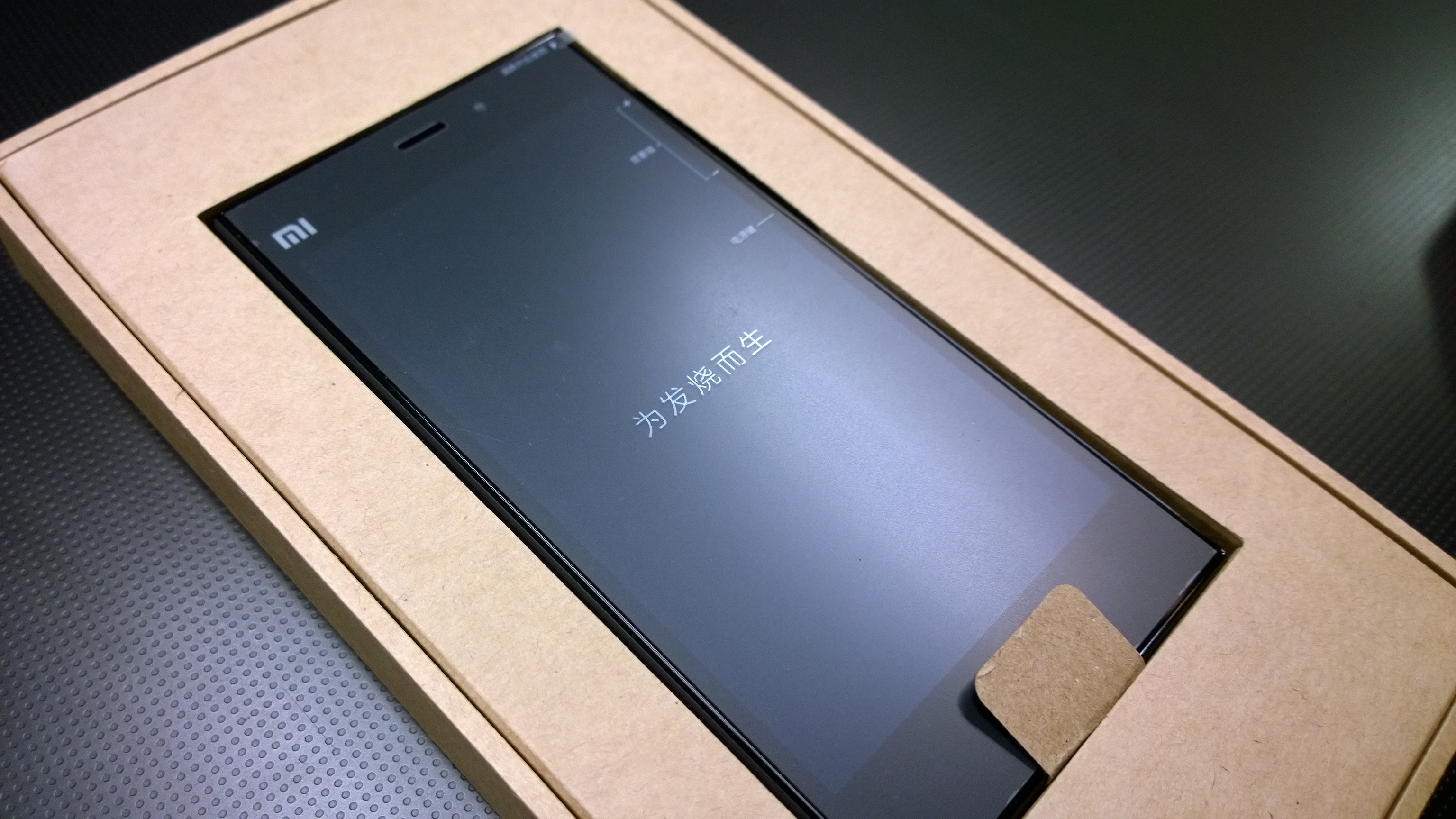 Le Xiaomi Mi3 dans son emballage en carton recyclé.